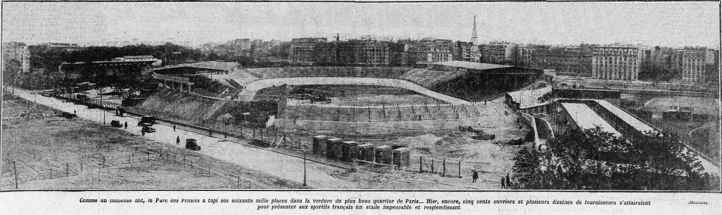 photo du stade du Parc des Princes du 22 avril 1932, veille de son inauguration dans cette configuration. Ce cliché fut publié en première page du quotidien sportif L'Auto N°11.452 du 23 avril 1932. Ce cliché ne porte pas de mention sur l'identité du photographe mais seulement le nom de l'agence de photo : "Meurisse" (agence de photo française active de 1909 à 1937). C'est donc un cliché dit "anonyme" qui tombe dans le domaine public en France 70 ans après sa publication. Source : photo perso du numéro de L'Auto de ma collection. User:Clio64